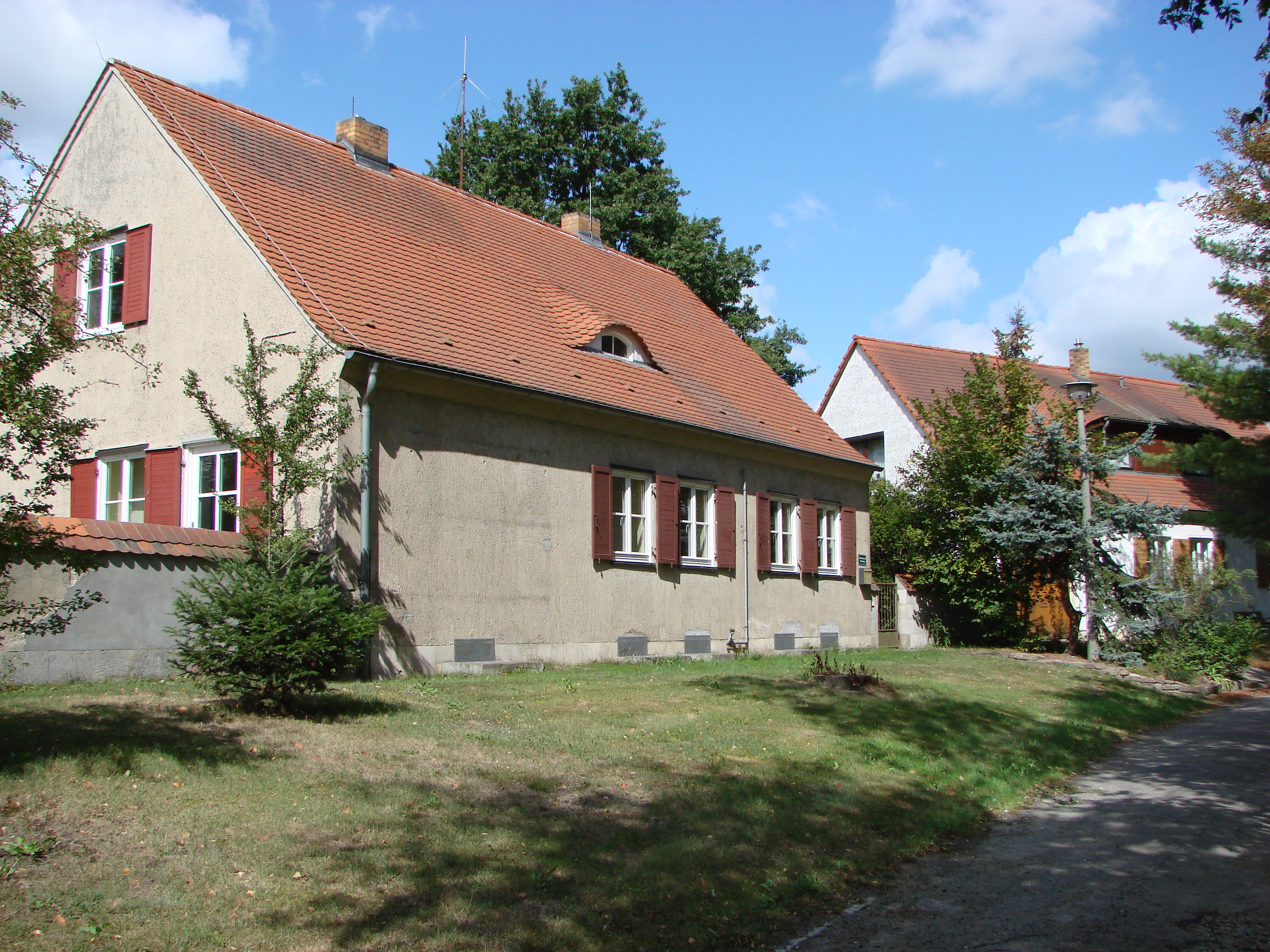 Wohngebäude der Siedlung, die ehemals für die Mitarbeiter der Sendestation aufgebaut wurde.